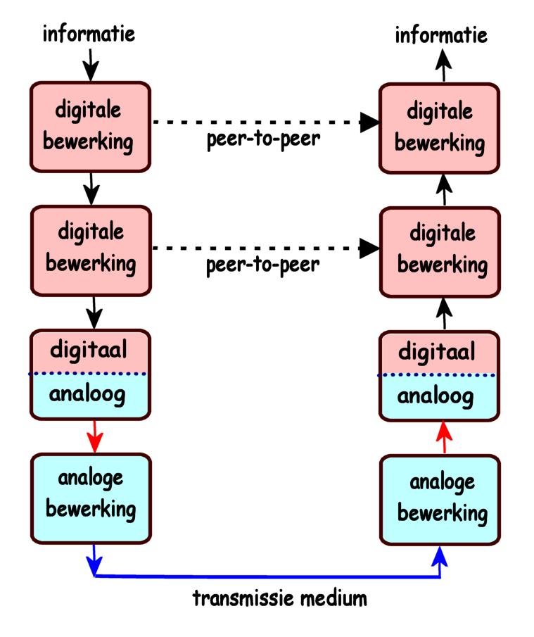 Gelaagde structuur digitale transmissie